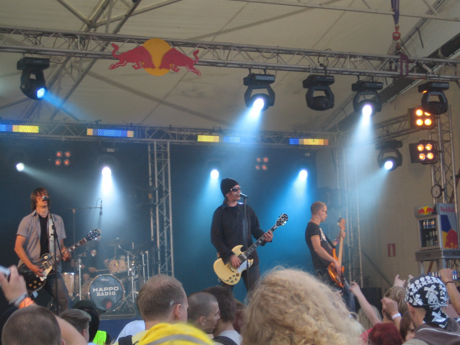 Happoradio, Raumanmeren juhannus 2006, Finland.